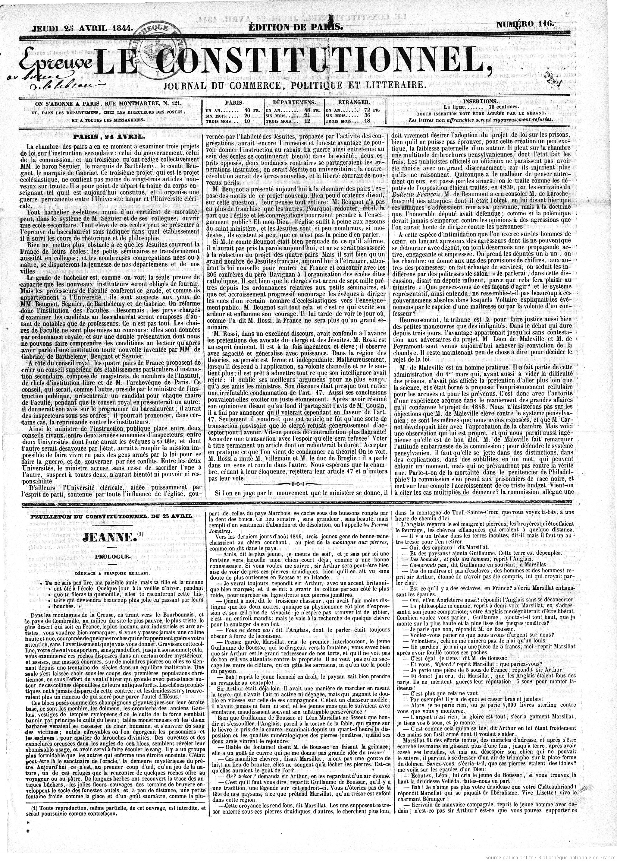 "Le Constitutionnel", journal français, 25 avril 1844, page 1. En bas de la page figure le début du premier épisode du roman de George Sand "Jeanne". Document numérisé sur Gallica, base de données de la Bibliothèque nationale de France, et mis en ligne le 6 février 2011. La notice du document indique que le document est dans le domaine public.